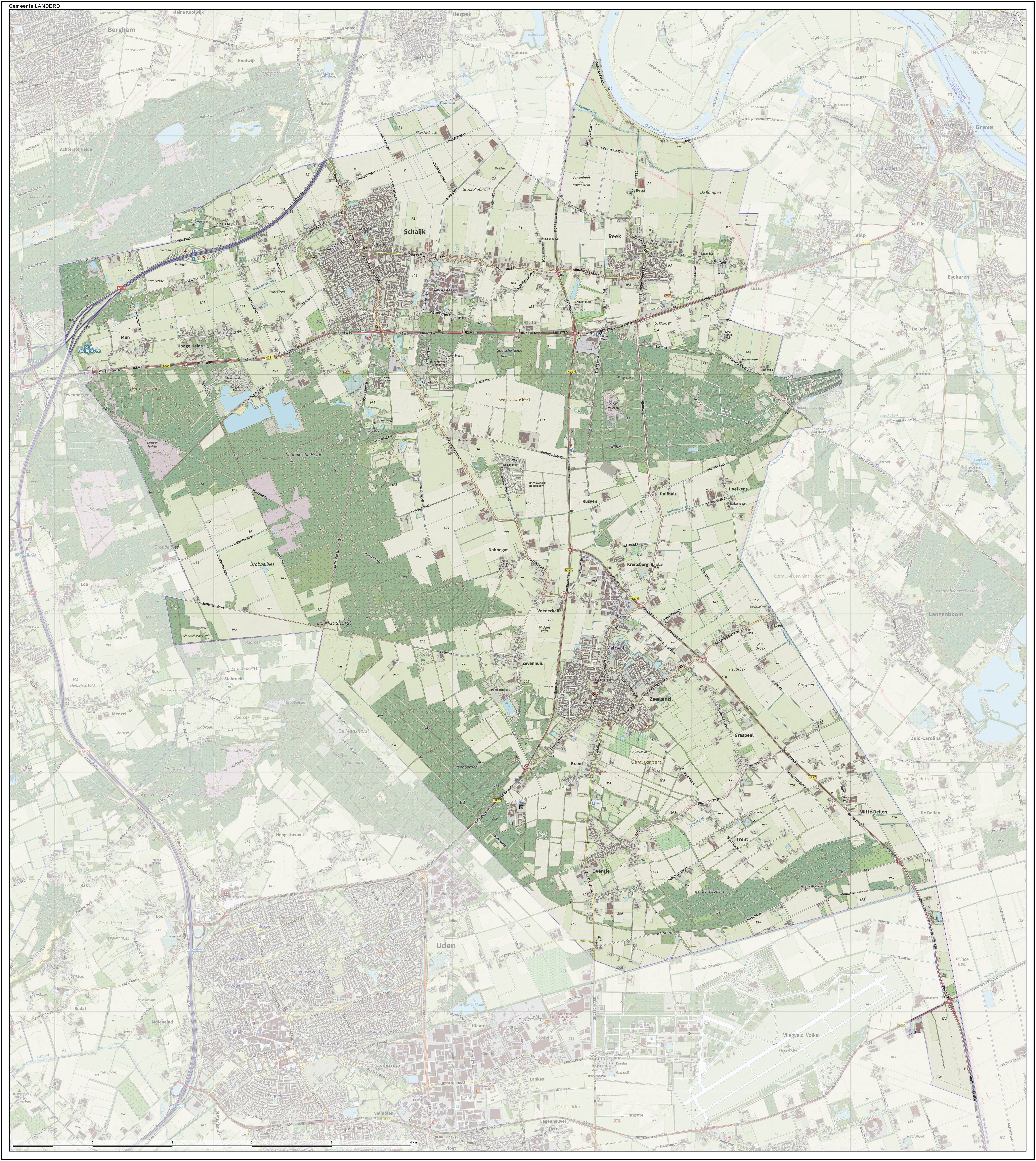 Topografische gemeentekaart. Resolutie: 300 pixels/km. Kaartbeeld samengesteld uit de open geodata van de Top10NL en Top25namen (Kadaster), Creative Commons-BY licentie. Gebouwvlakken uit open geodata BAG extract. Wegen uit de OpenStreetMap, OpenStreetMap community. Reliëfschaduw uit de Actuele Hoogtekaart AHN2. Samenstelling en kleurenschema: Jan-Willem van Aalst, met QGIS. Zie ook de Legenda.